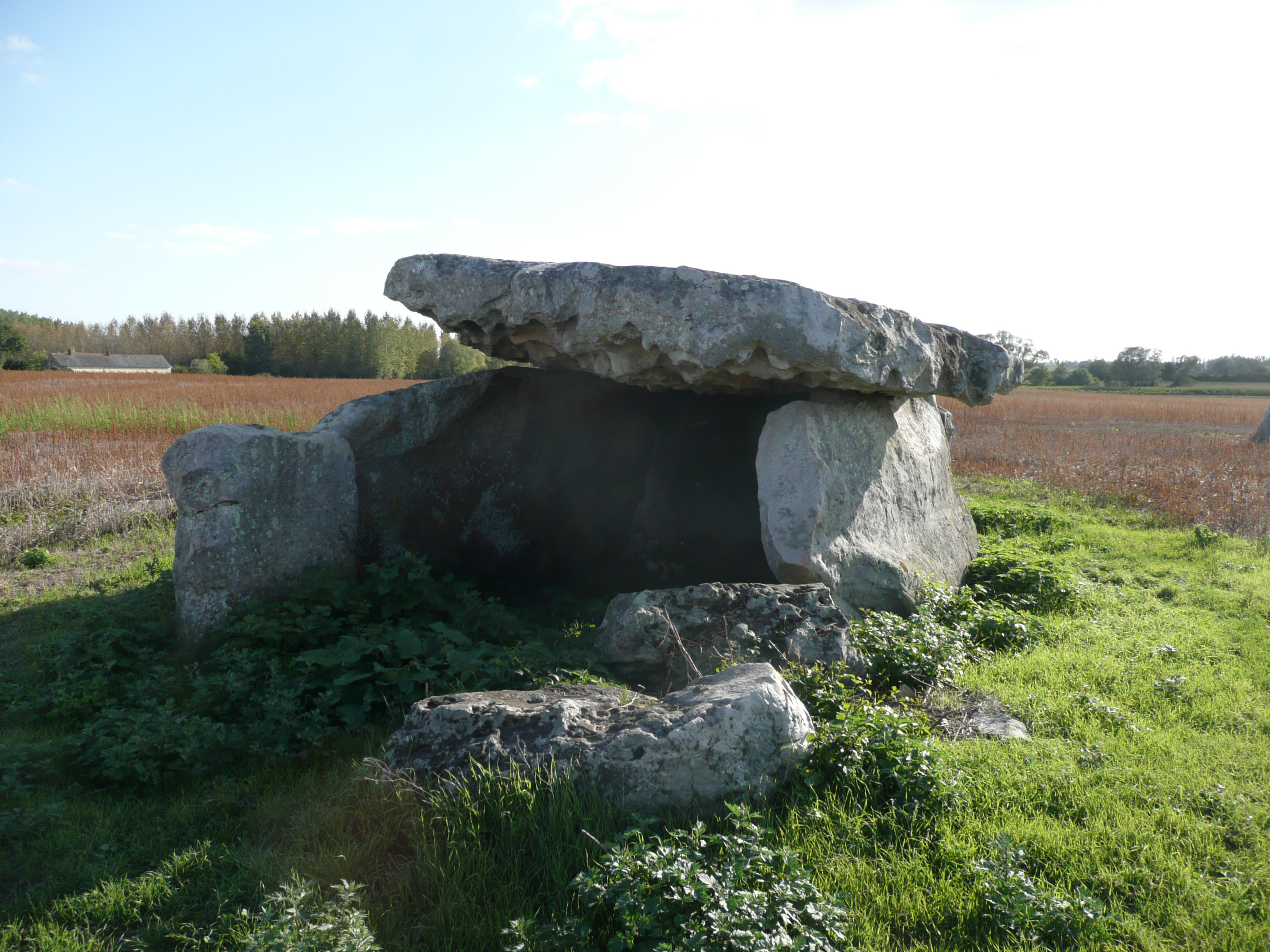 Charcé - Mégalithes .